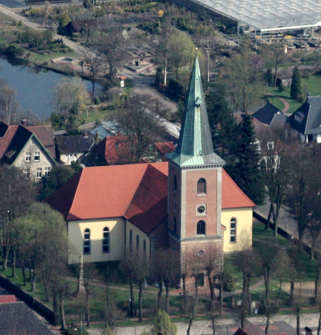 Harpstedt, Landkreis Oldenburg, Niedersachsen: Ev. Christuskirche